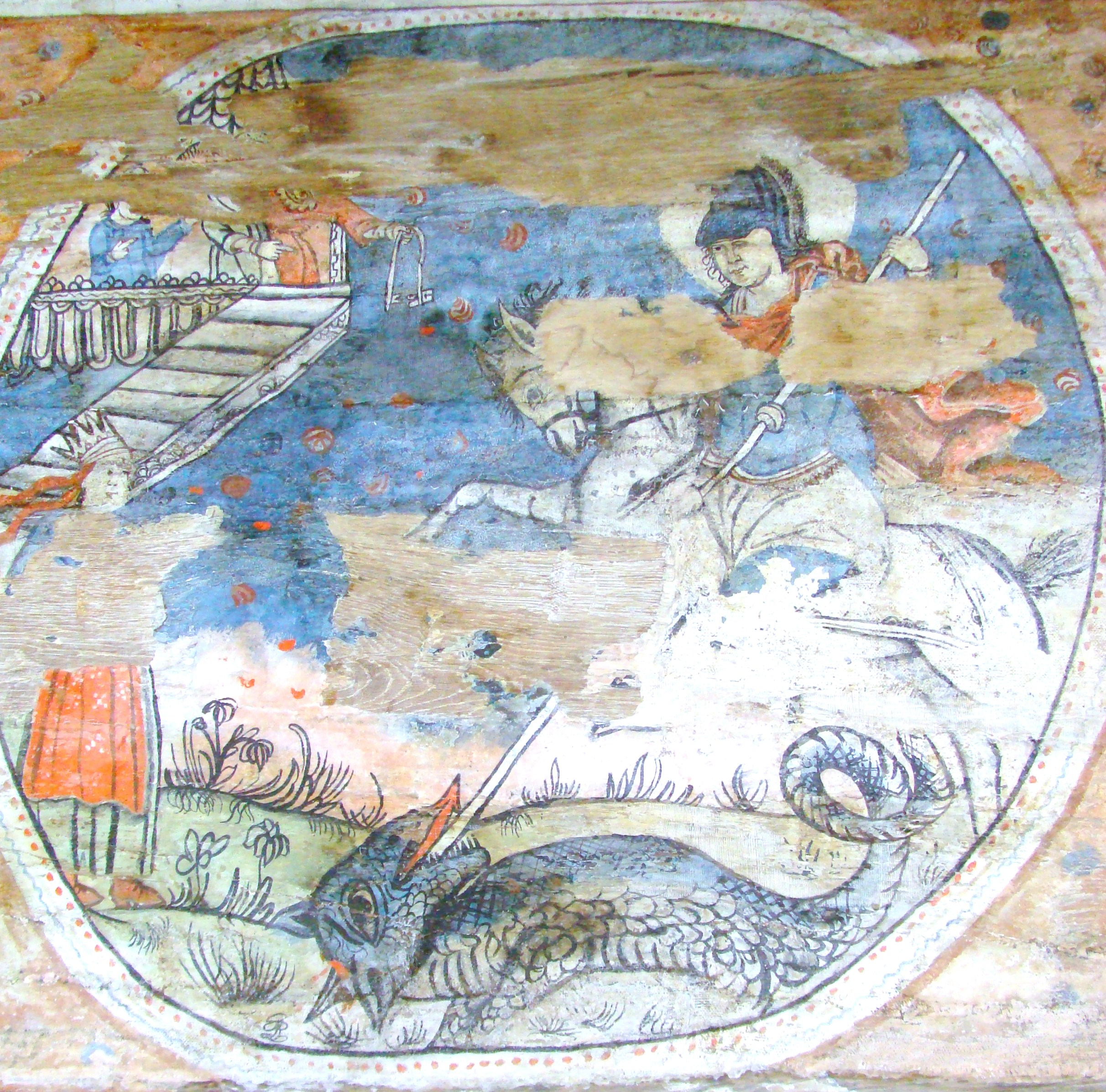 Biserica de lemn "Intrarea Maicii Domnului în Biserică" , sat BÂRSANA